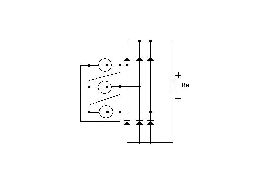 Трёхфазный выпрямитель "треугольник-Ларионов".